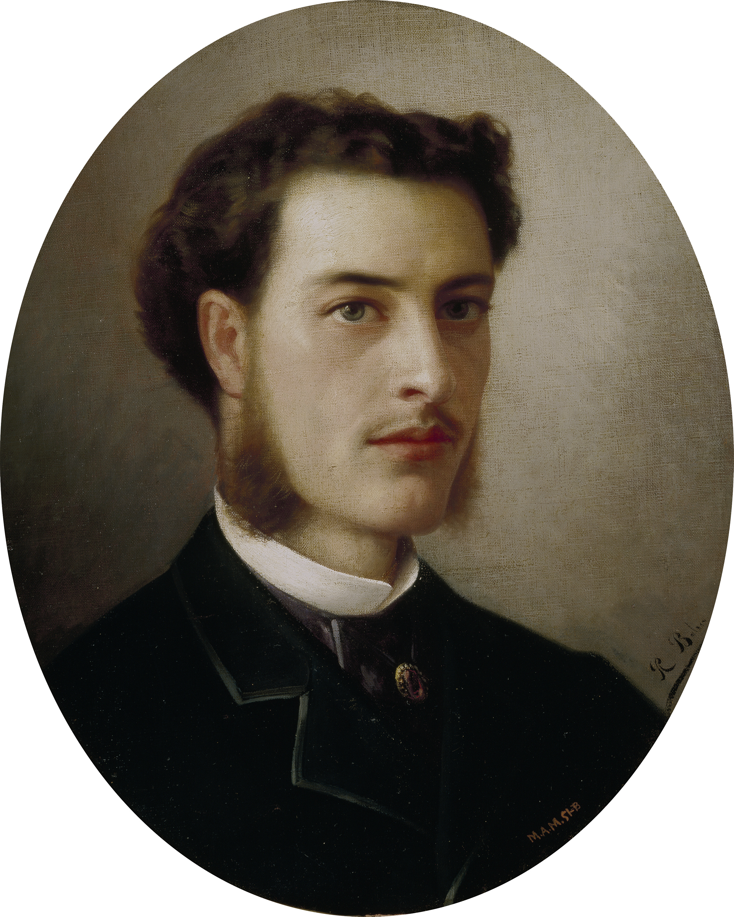 Autorretrato del pintor español Ricardo Balaca (1844-1880).